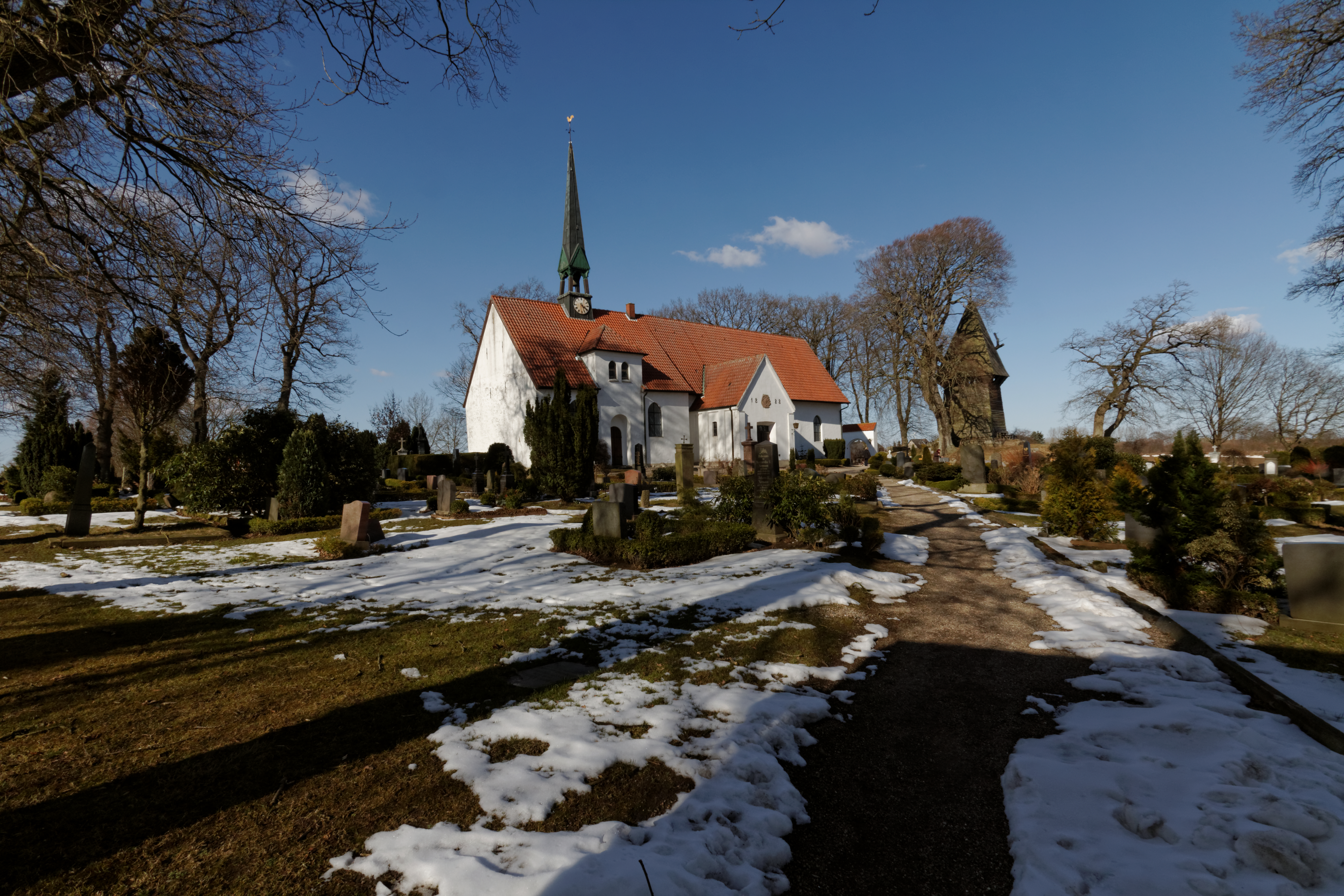 Ulsnis, Kirche St. Wilhadi